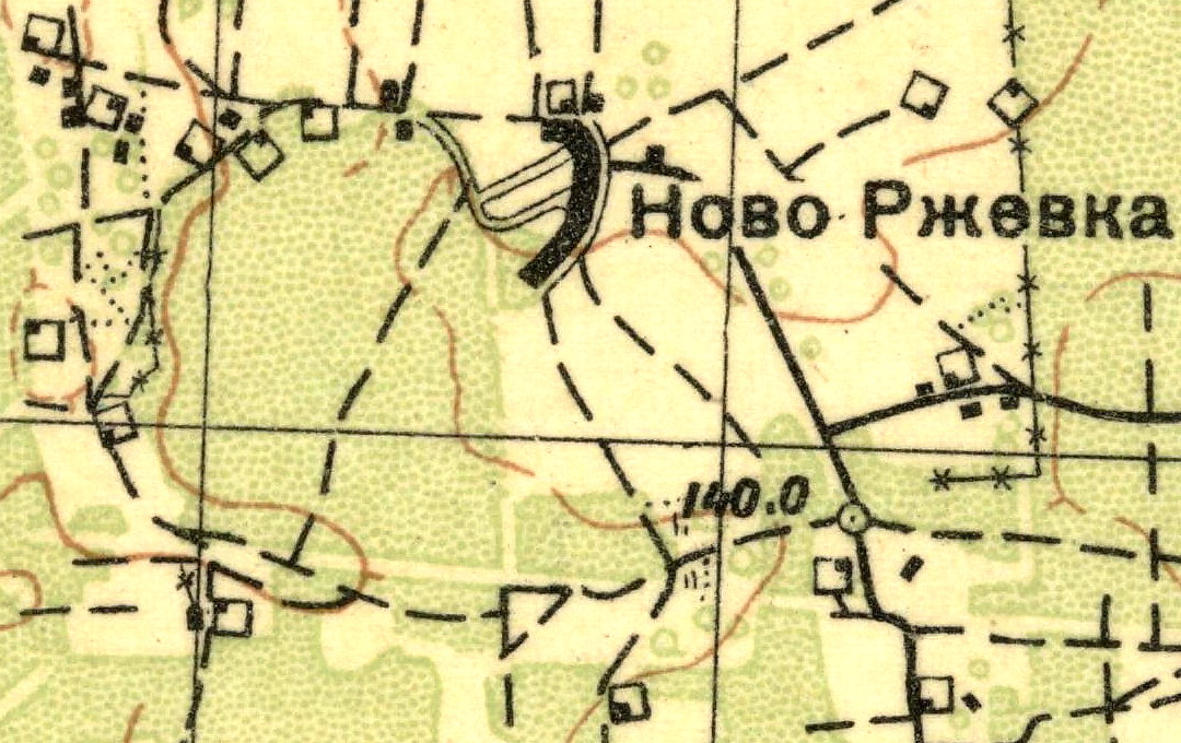 Топографическая карта Ленинградской области, квадрат О-35-23-Г (Волосово), деревня Ржевка